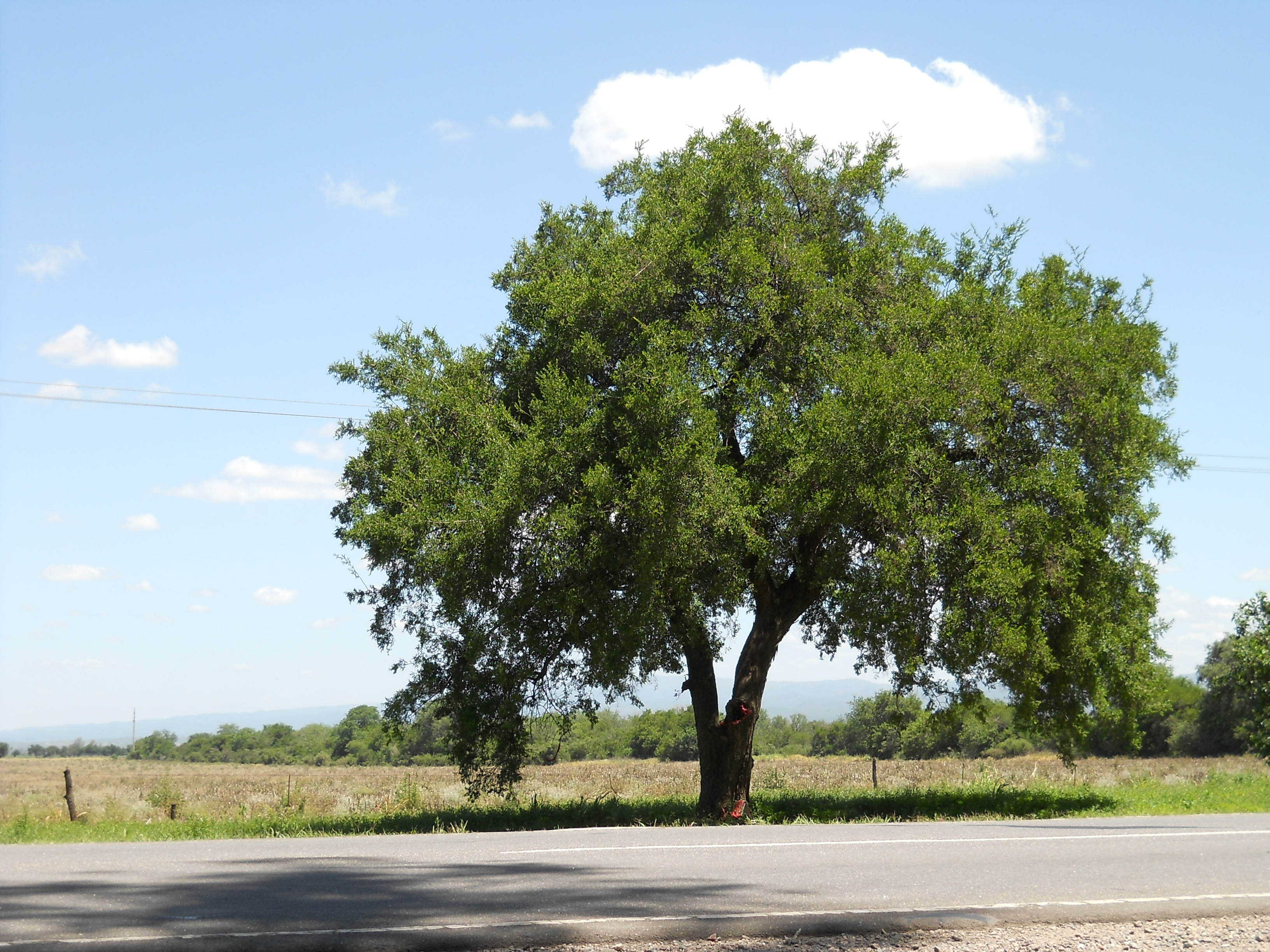 Vista completa del árbol